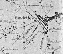 Plan de la commune de Fondettes réalisé en 1940. Archives du Sénat français.